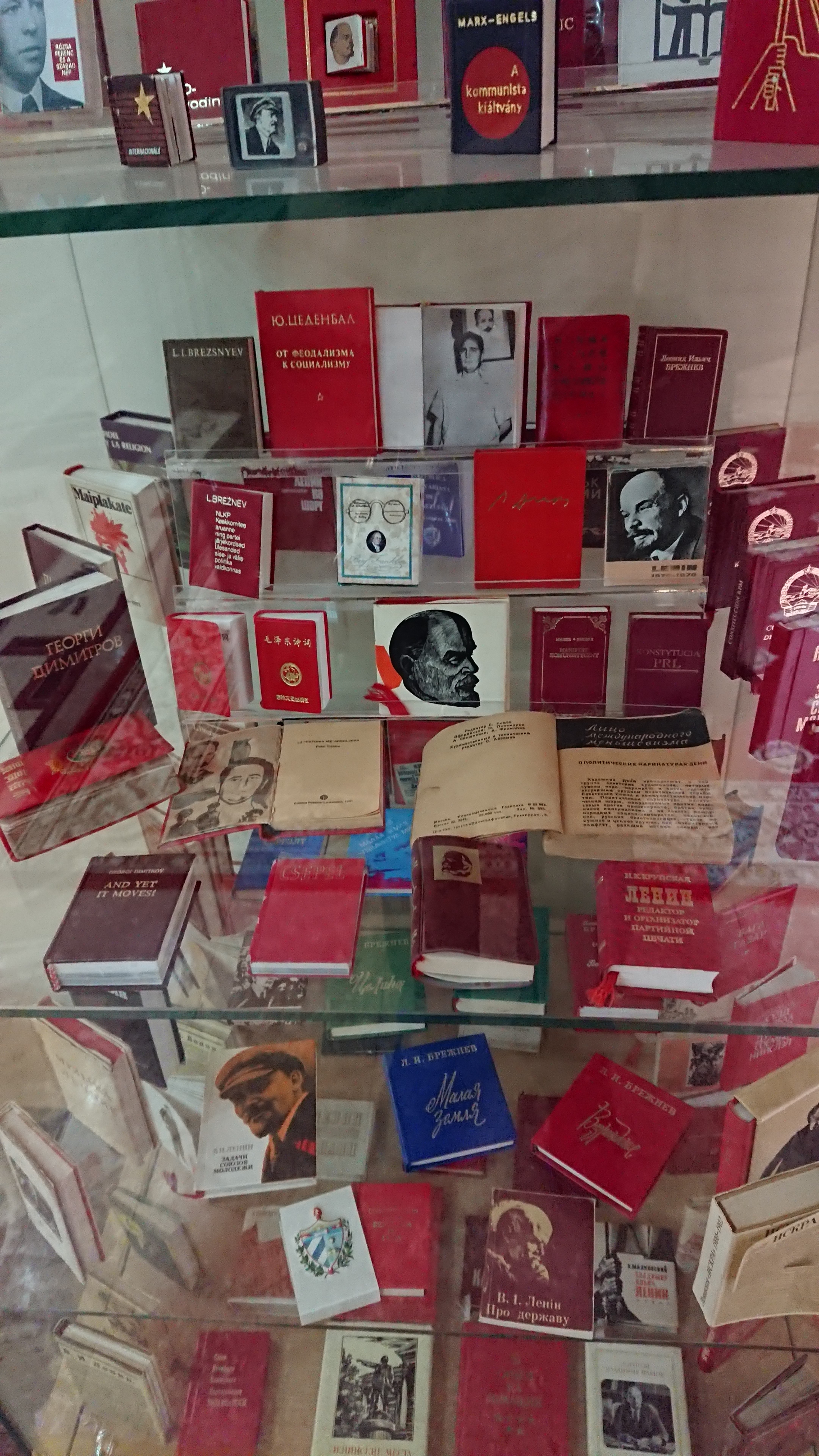 Музей миниатюрной книги, Баку.